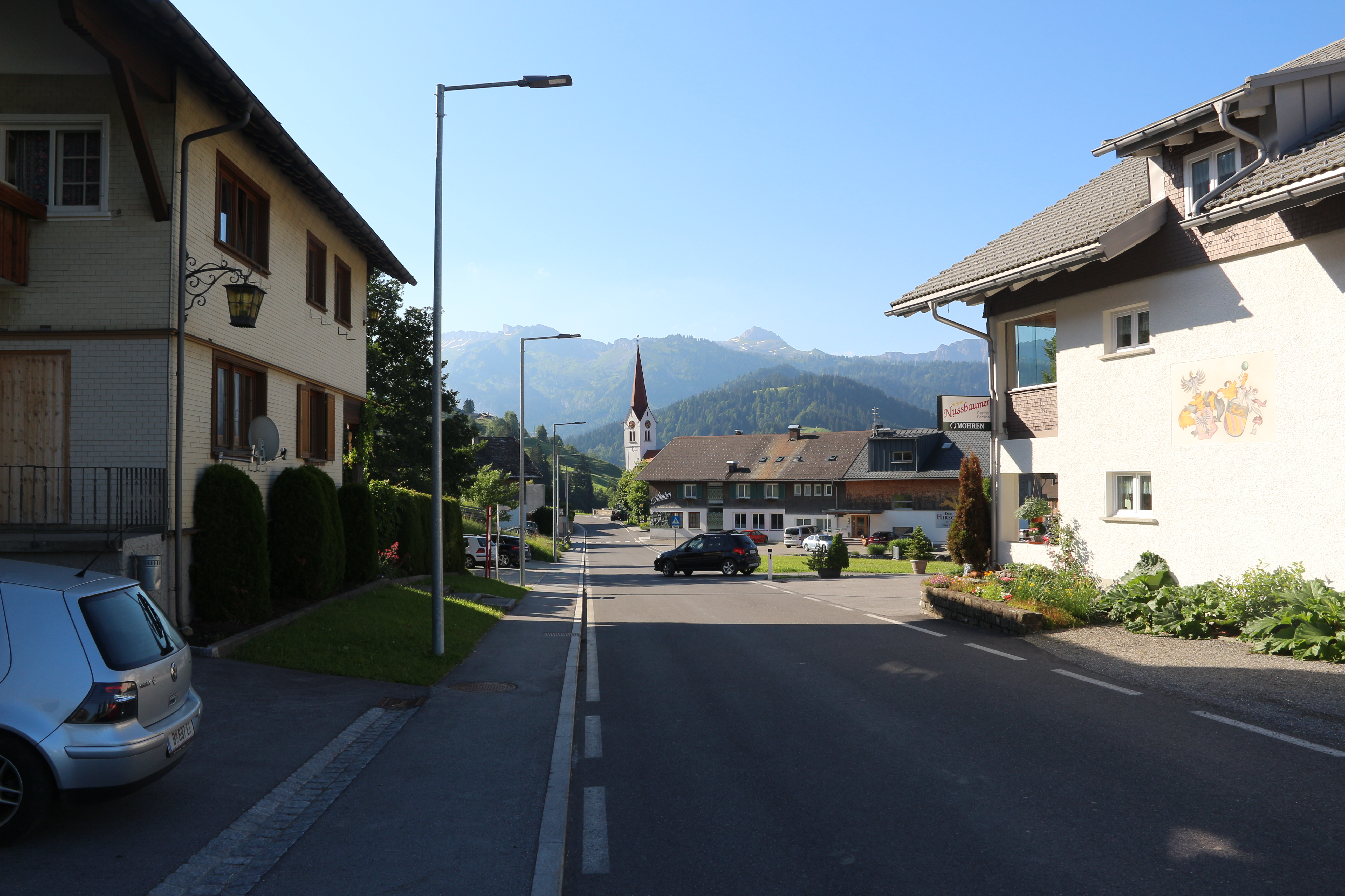 Hauptstraße in Sibratsgfäll, Vorarlberg.